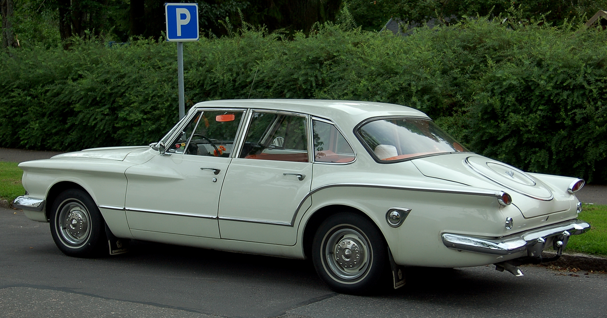 CHRYSLER VALIANT V 200 Färg: VIT Fordonsår: 1960 Chassinummer: 1300103833 Tekniska data Växellåda: MANUELL Tjänstevikt, kg: 1350 Totalvikt, kg: 1350 Längd, mm: 4750 Bredd, mm: 1770 Drivmedel 1: BENSIN Motoreffekt, kw: 74,0